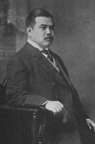 津軽英磨（1872～1919）